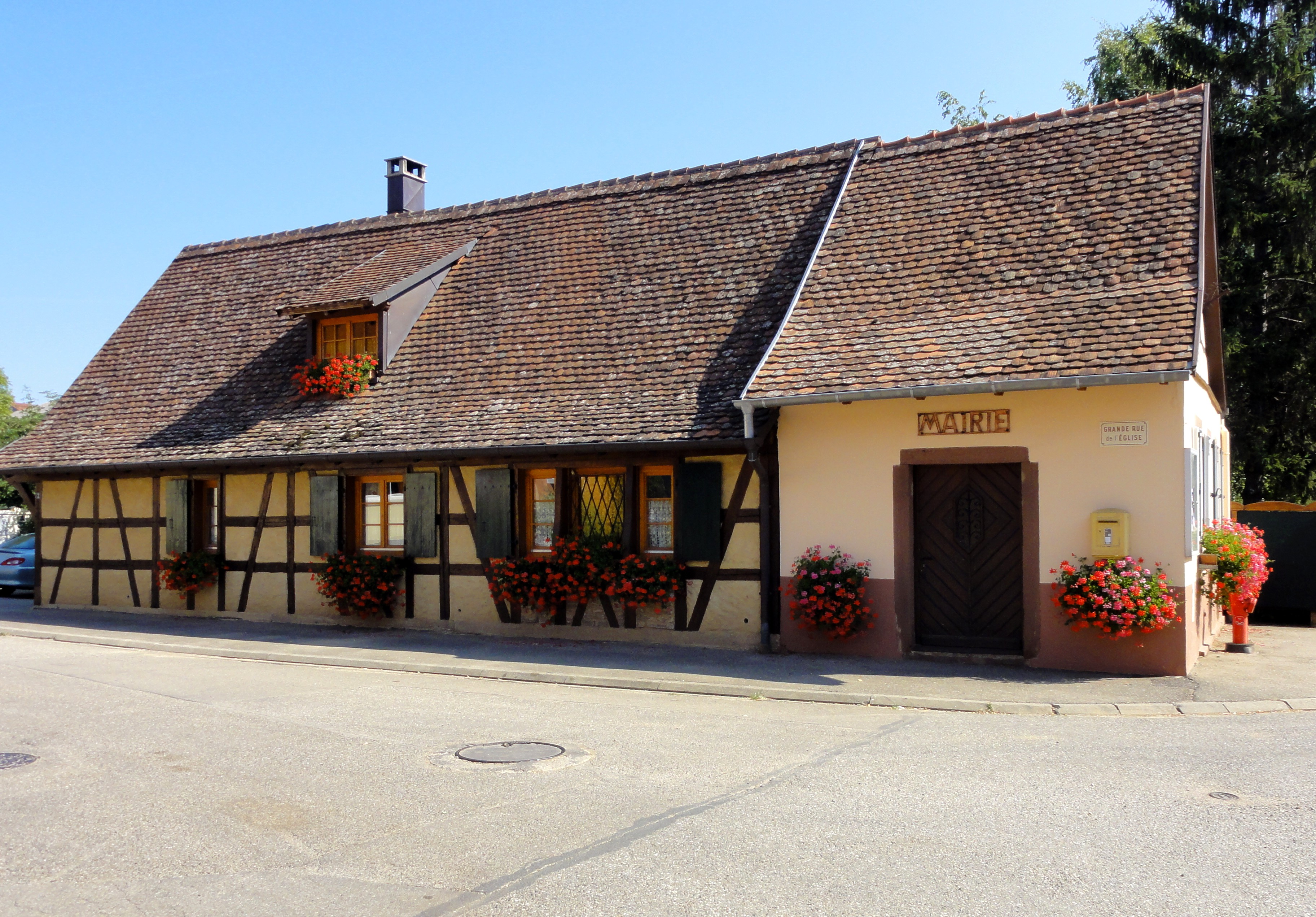 Alsace, Bas-Rhin, Woellenheim, Mairie, ancienne maison de berger. .